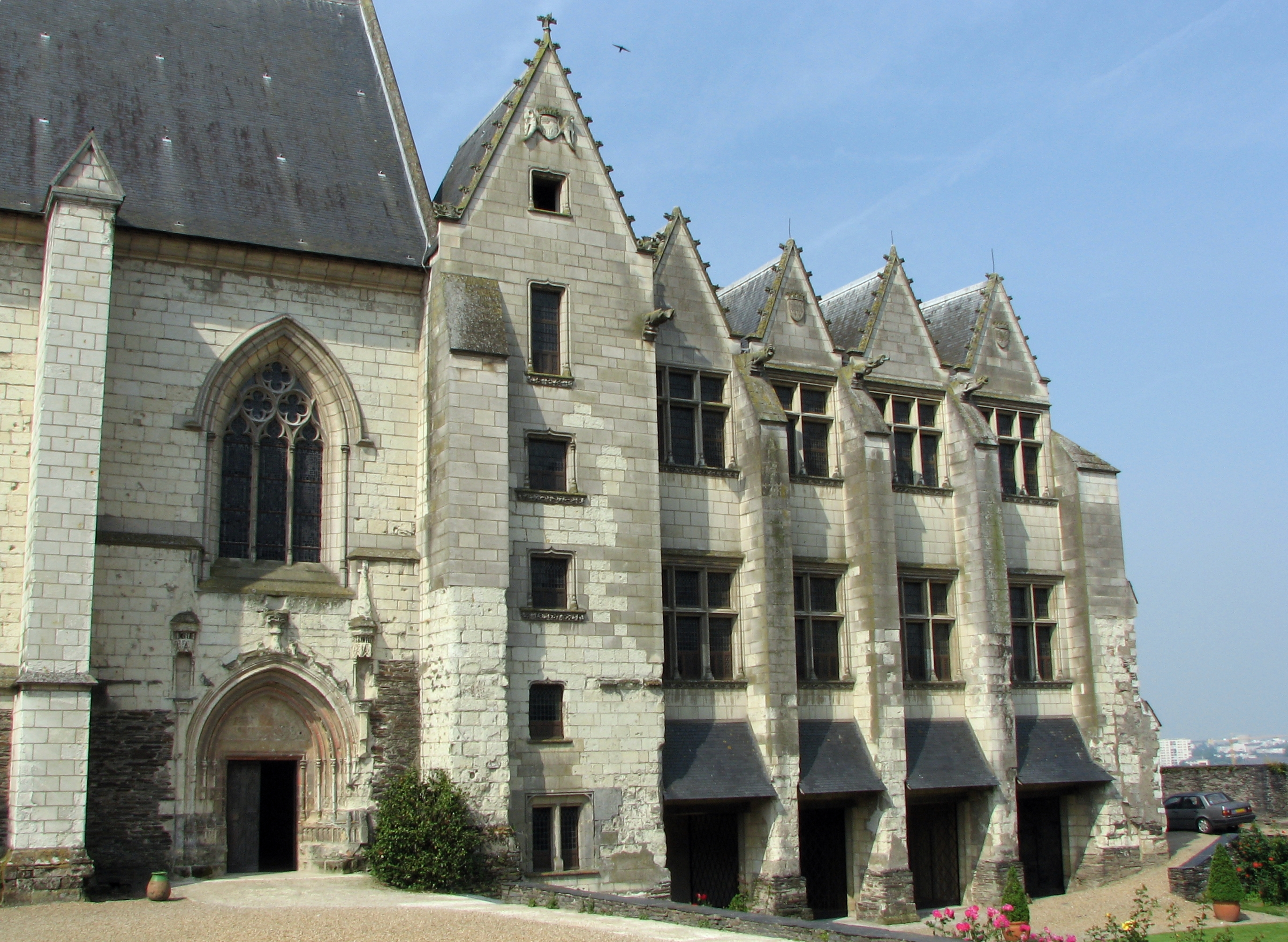 Château d'Angers : chapelle à gauche et à droite le logis royal.